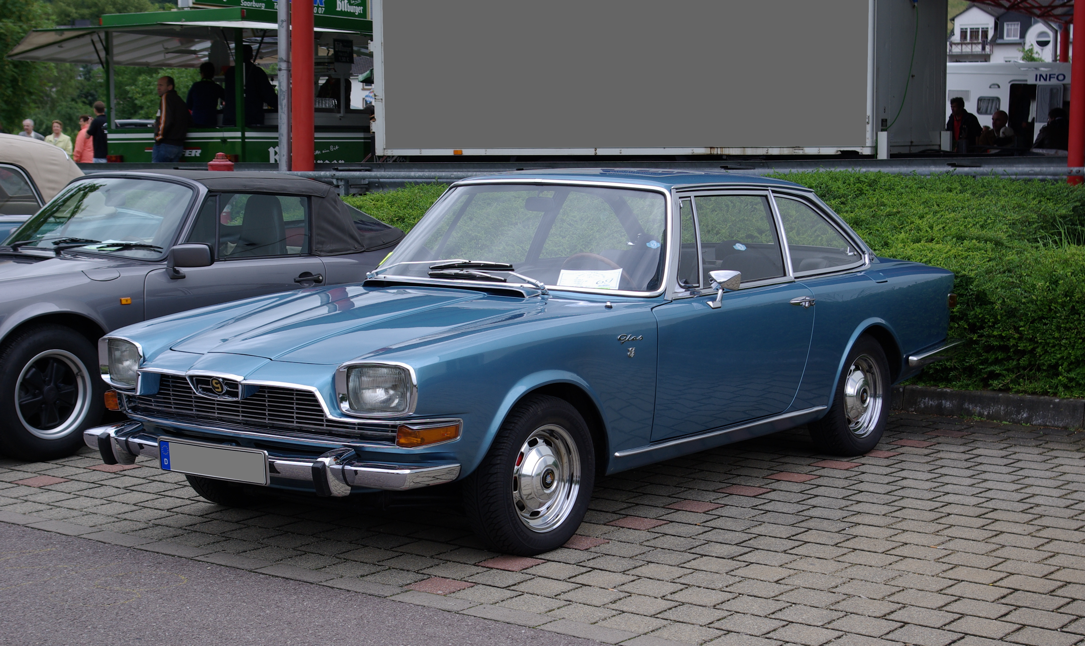 Glas V8 Baujahr 1967 Leistung 150 PS Hubraum 2580 cm³ Höchstgeschwindigkeit 192 km/h Neupreis 19400 DM aufgenommen bei / photographed at "25. Internationales Konzer Oldtimer-Treffen", 19. Juli 2009